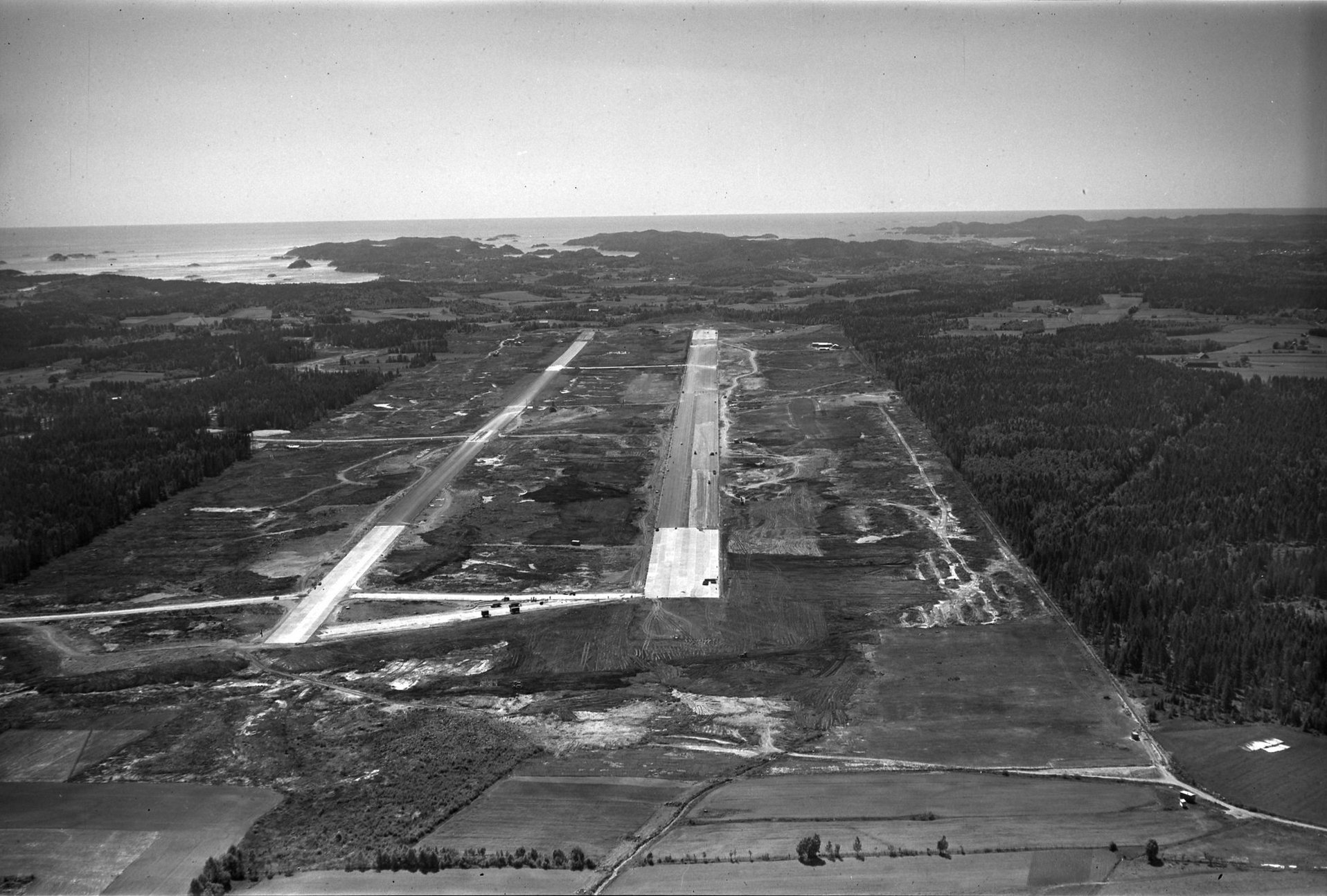 FW.FS.11913